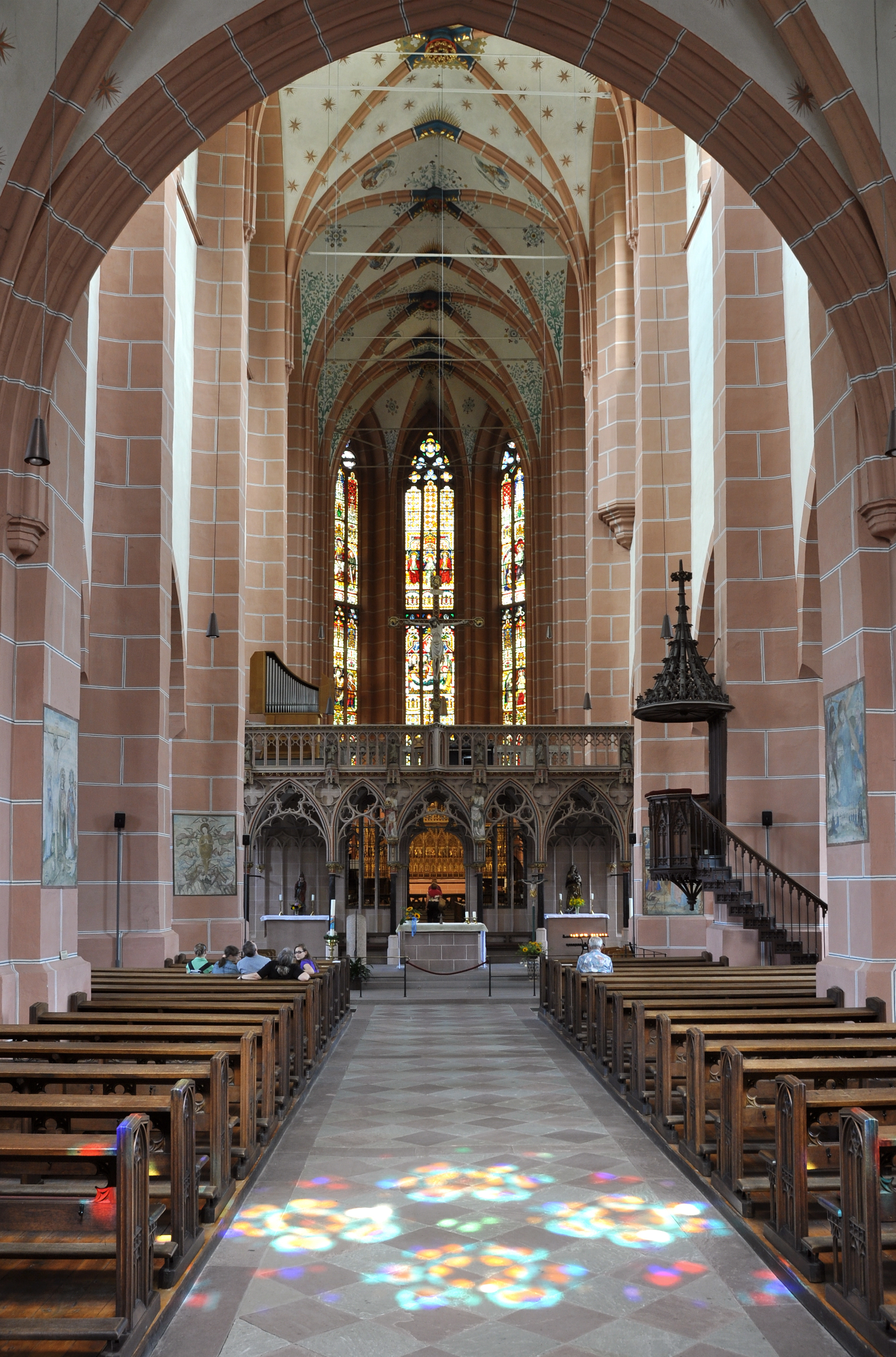 Mittelschiff nach Osten